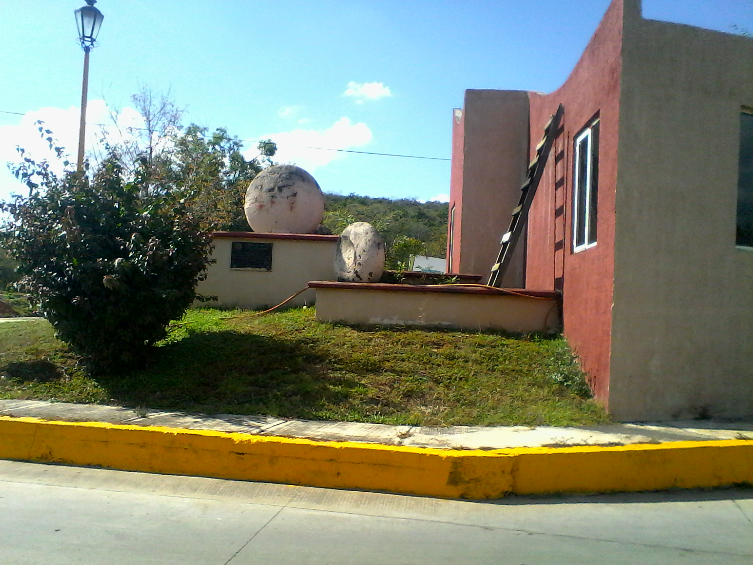 Monumento a la lenteja en Coeneo